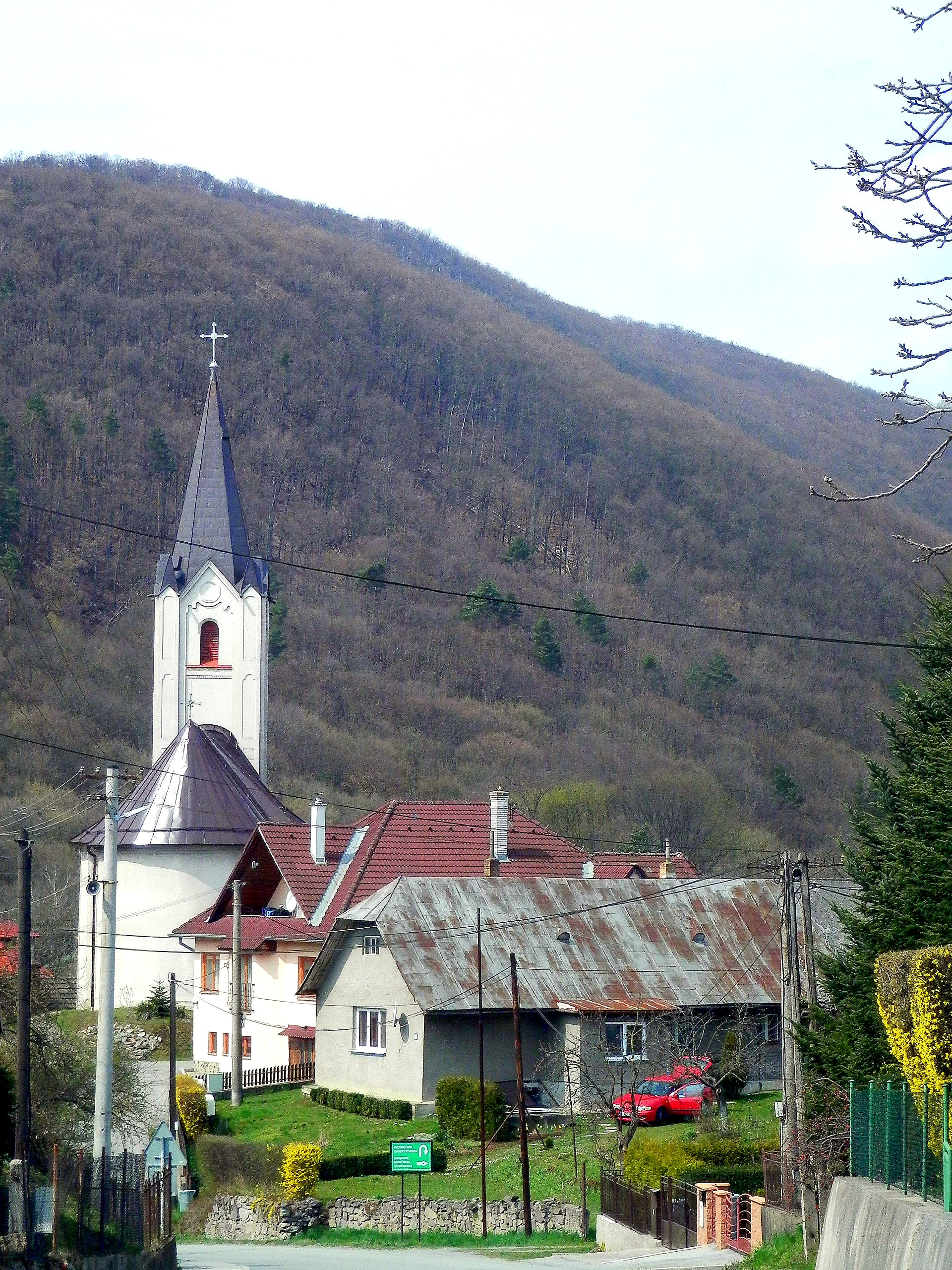 Evanjelický kostol, obec Obišovce, okres Košice okolie.